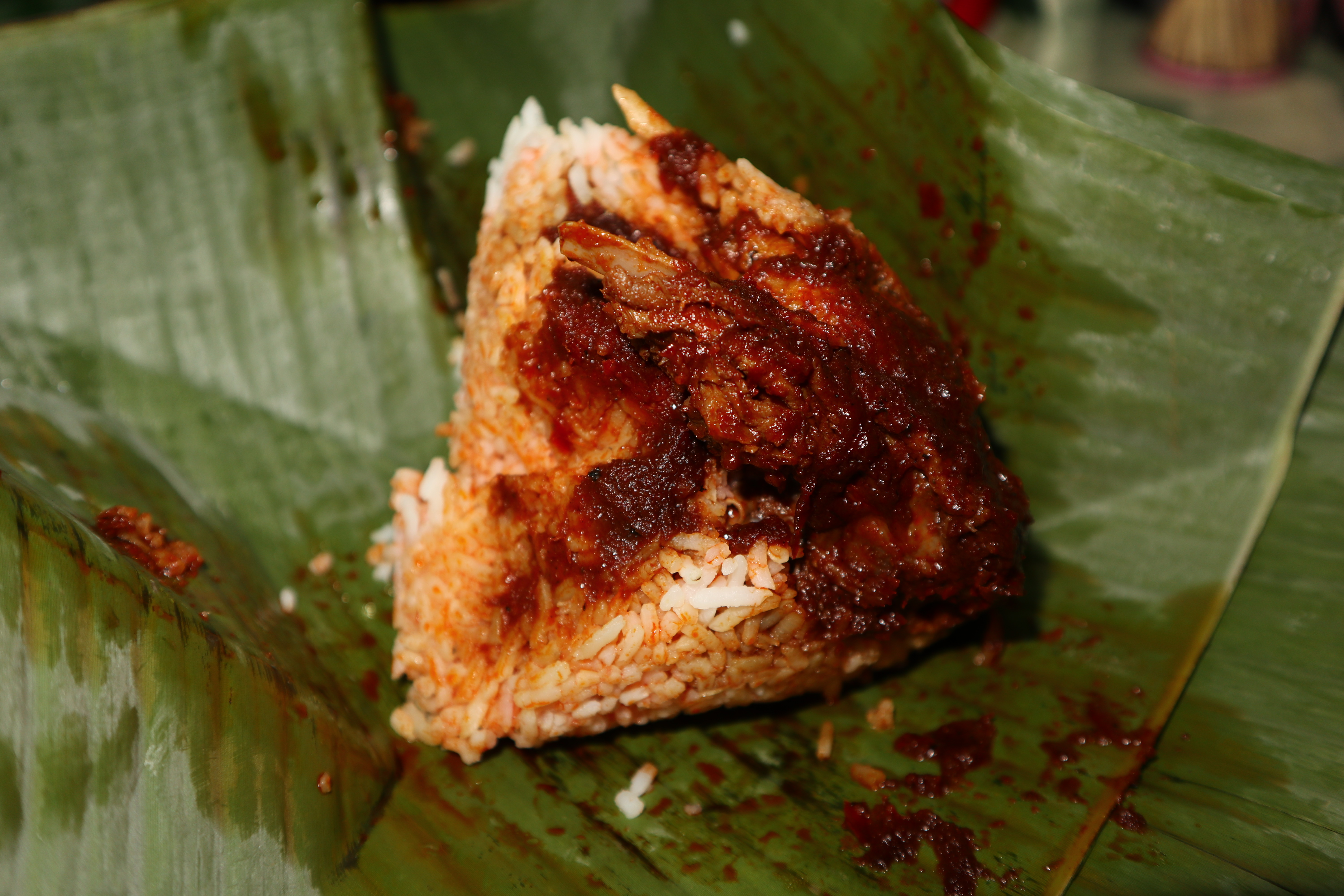 Nasi itik khas Gambut, Kalimantan Selatan, yang dijual oleh Warung Tenda Biru.